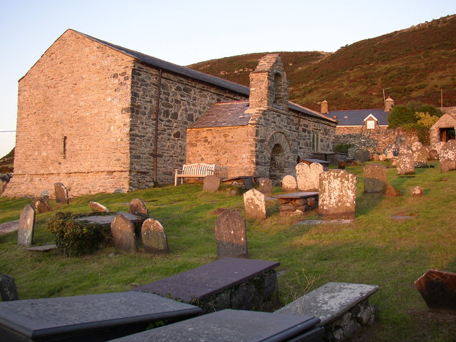 Llangelynnin Church near Tywyn, Gwynedd, Wales.